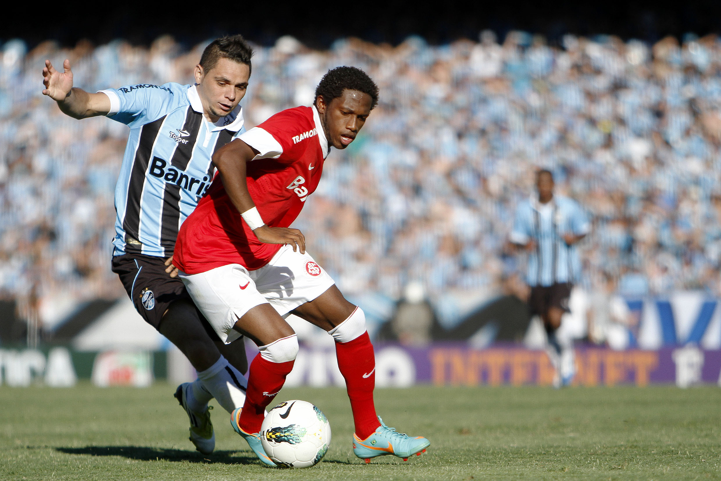 PORTO ALEGRE, RS - FUTEBOL - 02.12.2012 - Pará e Fred durante a partida entre Grêmio e Internacional pela última (38ª) rodada do Brasileirão 2012, na tarde desde domingo, no Estádio Olímpico Monumental. Foto: Guilherme Testa